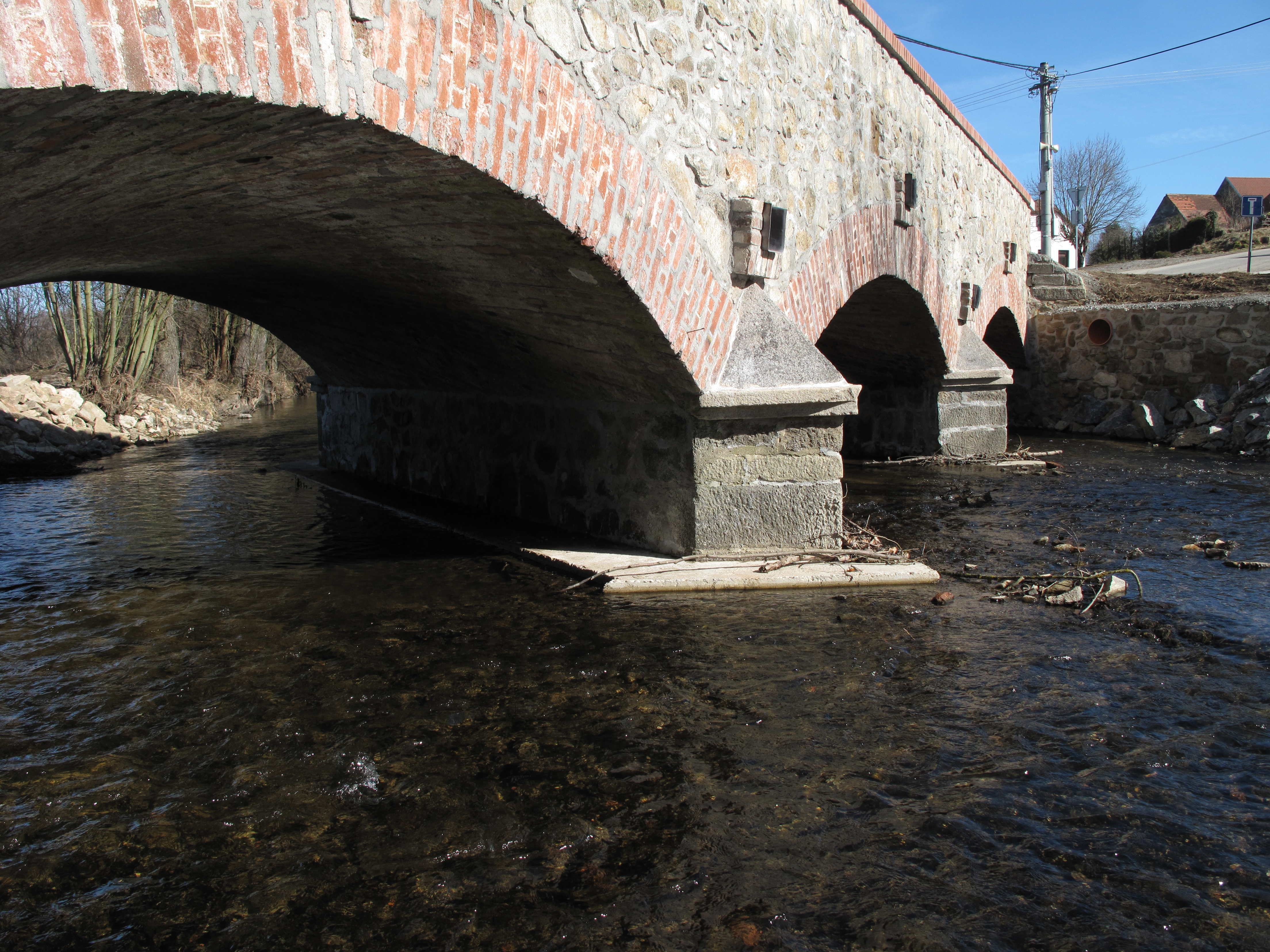 Most v Protivci. Okres Prachatice, Česká republika.